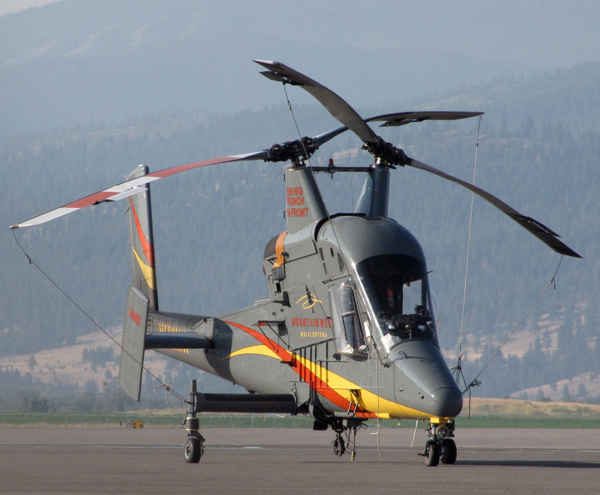 Kaman K-Max, Missoula MT / 2010